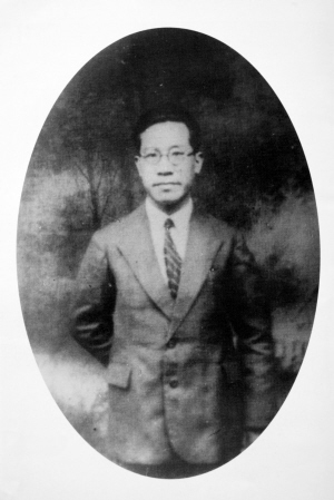 Yu Xiusong俞秀松